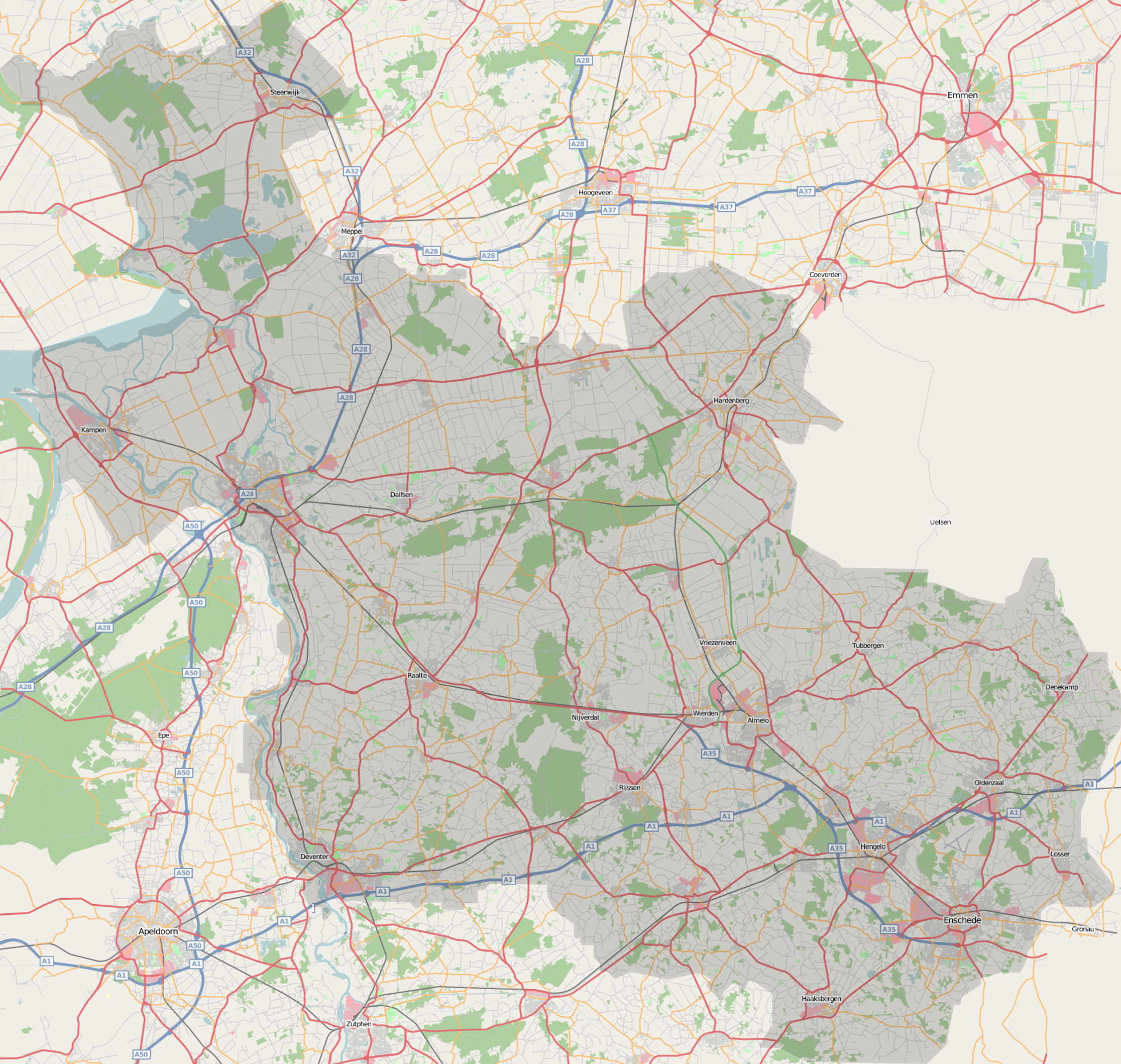 "Overijssel"